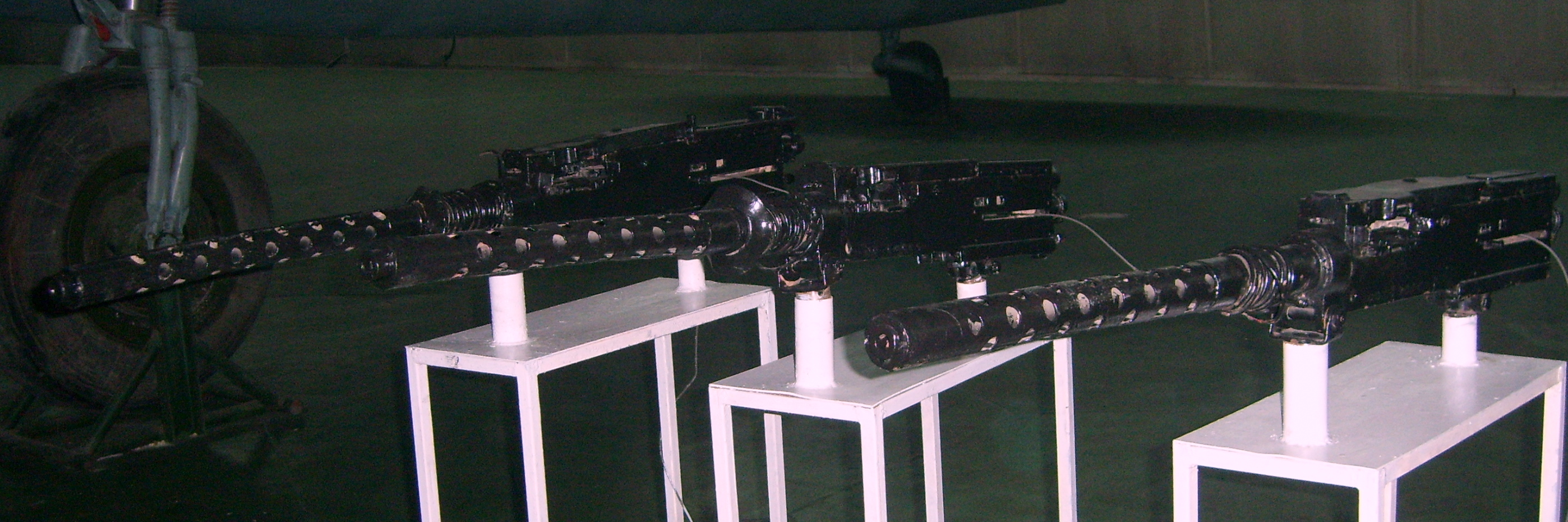 航空机关枪，摄于北京航空博物馆